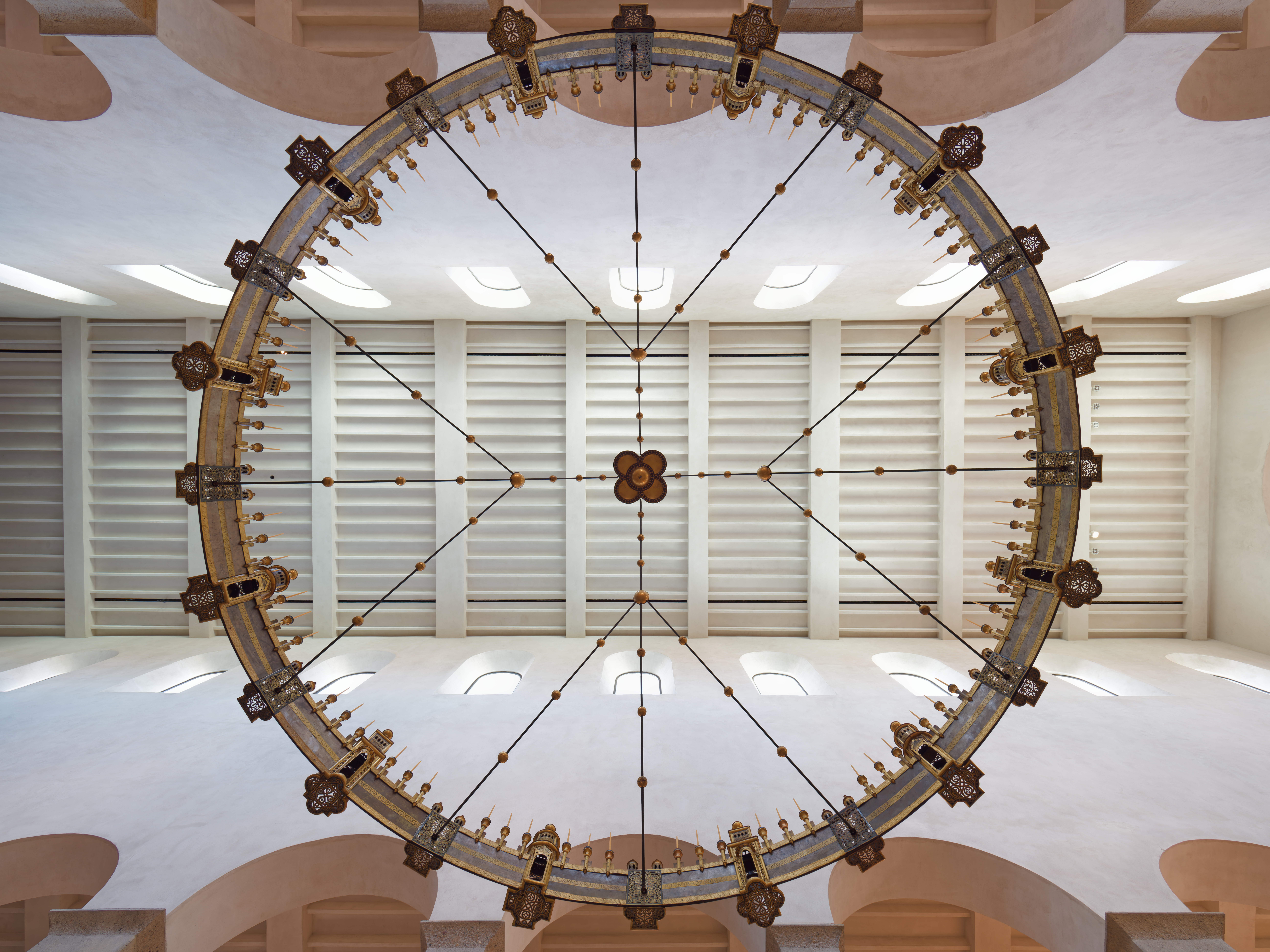 Hildesheimer Dom, St. Mariä Himmelfahrt, der Heziloleuchter, eine Stiftung von Bischof Hezilo aus dem Jahre 1061 in der Durchsicht von unten. Der Leuchter hat einen Durchmesser von ca. sechs Metern.